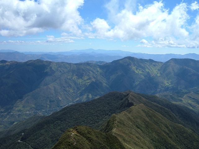 Vistas de Cajanuma desde una montaña.